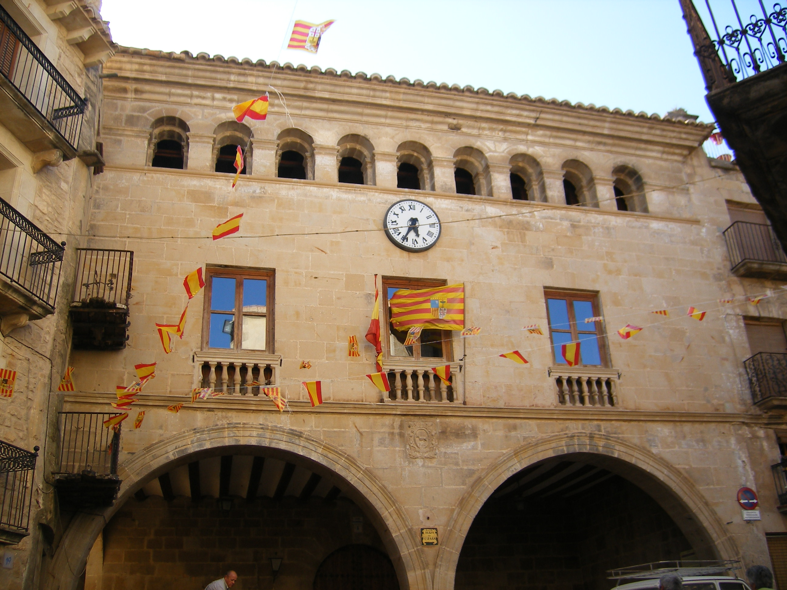 Aragonés: Conzello de Calazeit (Aragón).